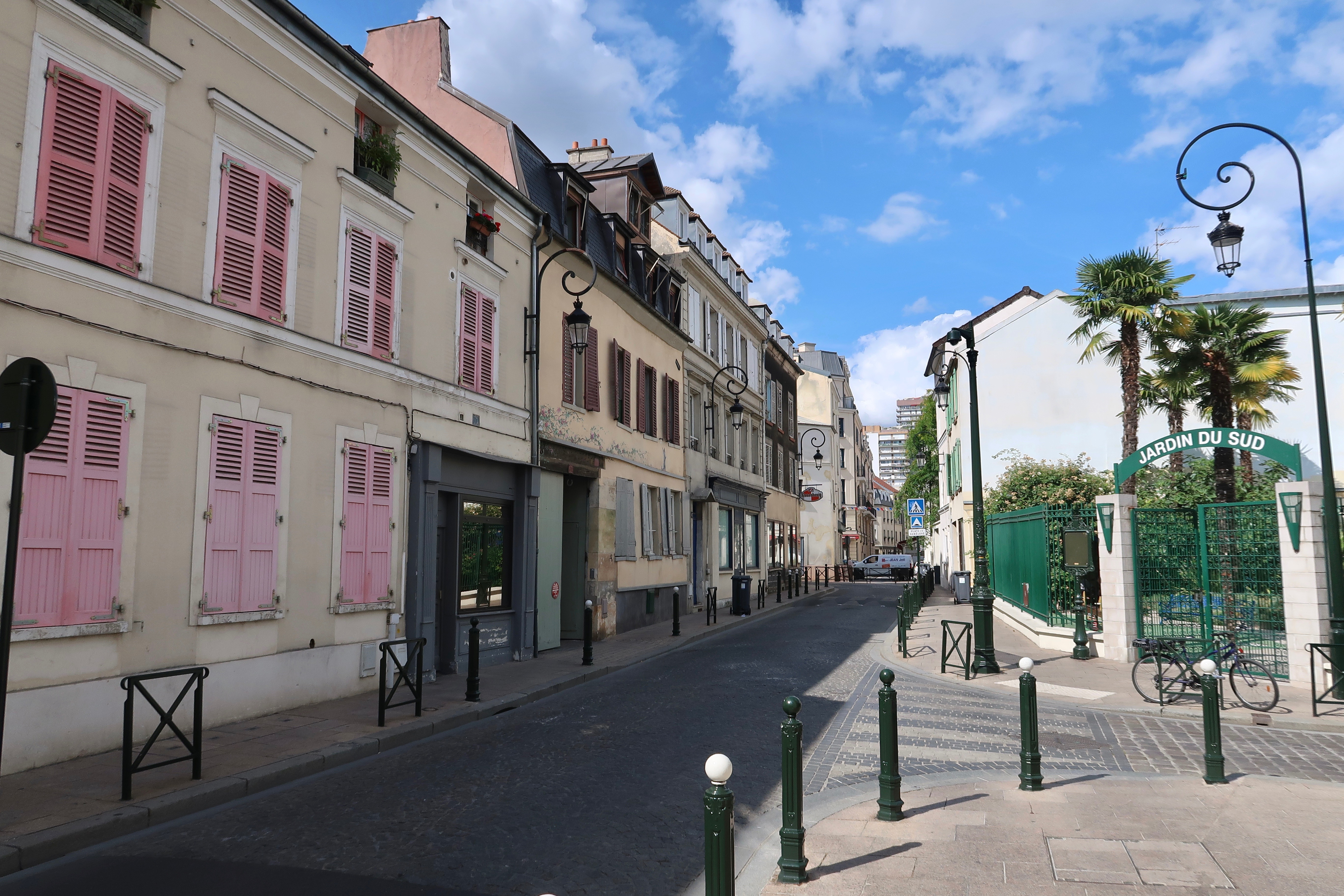 Rue Voltaire à Puteaux (Hauts-de-Seine).